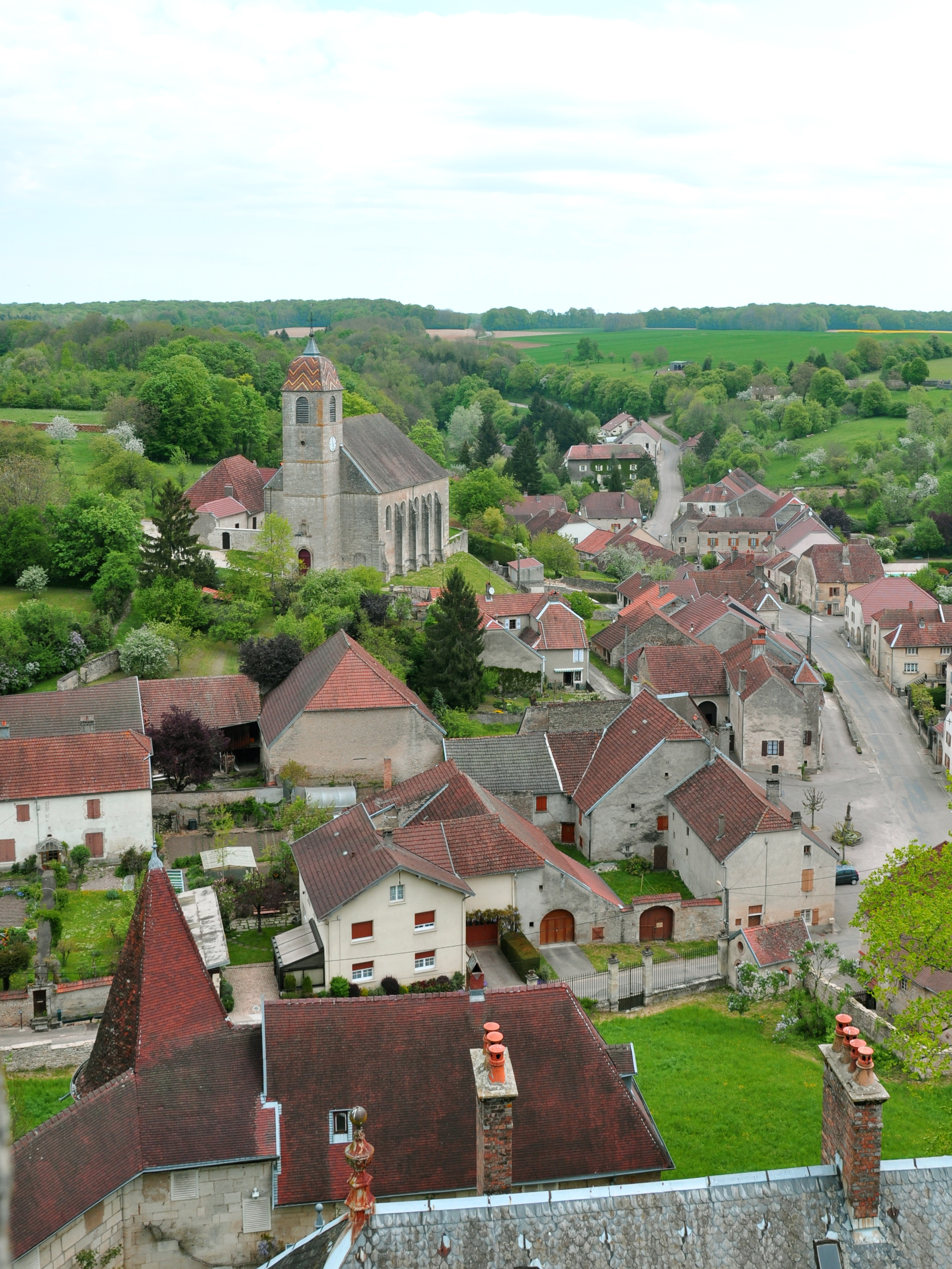 Rupt-sur-Saône, vu depuis le donjon du château.